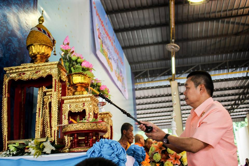 วันกตัญญู โรงเรียนสันป่าตองวิทยาคม